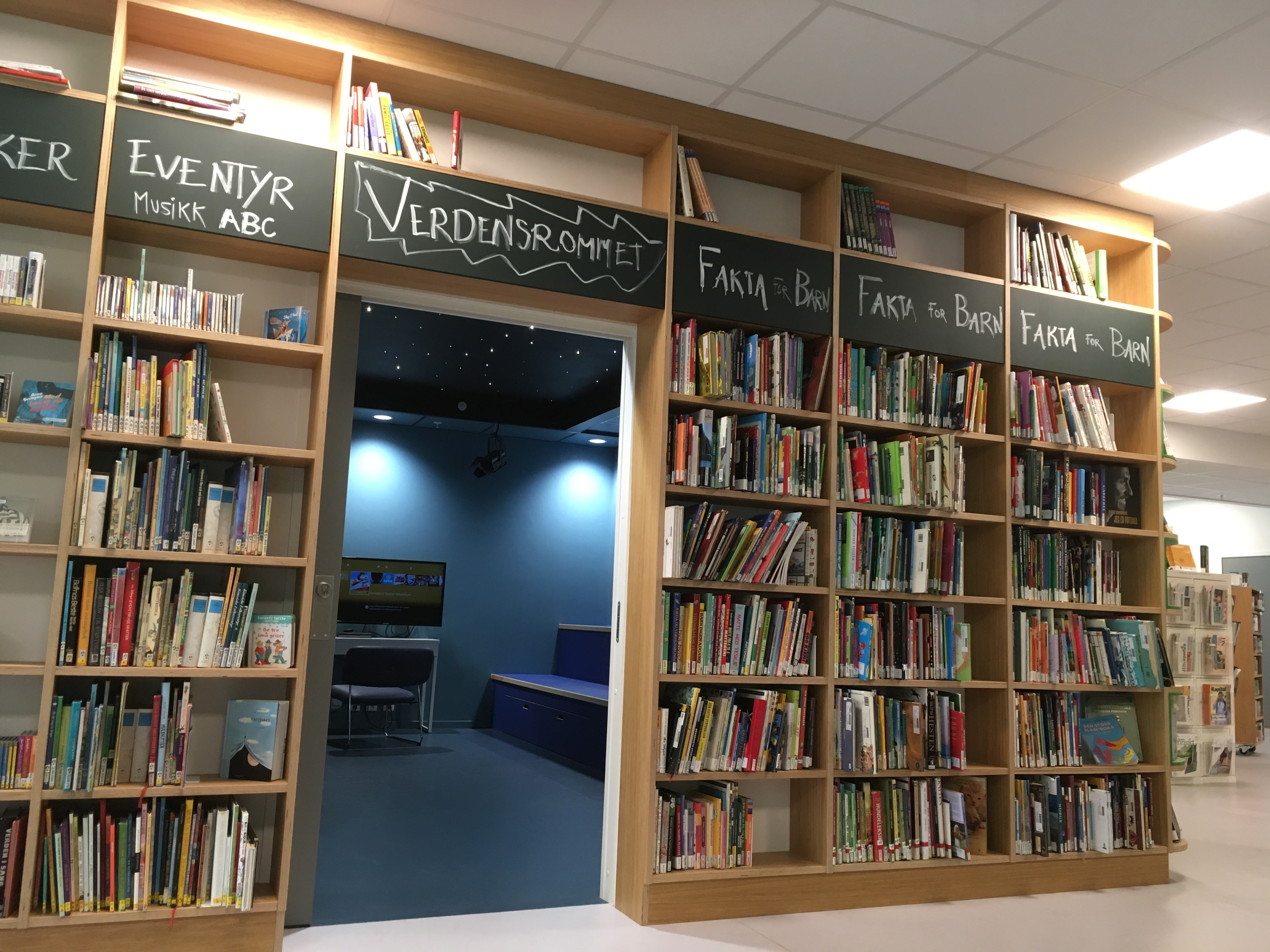 Risvollan bibliotek, et av Trondheim folkebiblioteks bydelsbibliotek, ble nyinnredet i 2017–2018, blant annet med et eget "Verdensrom", der det leses høyt, spilles spill m.m.